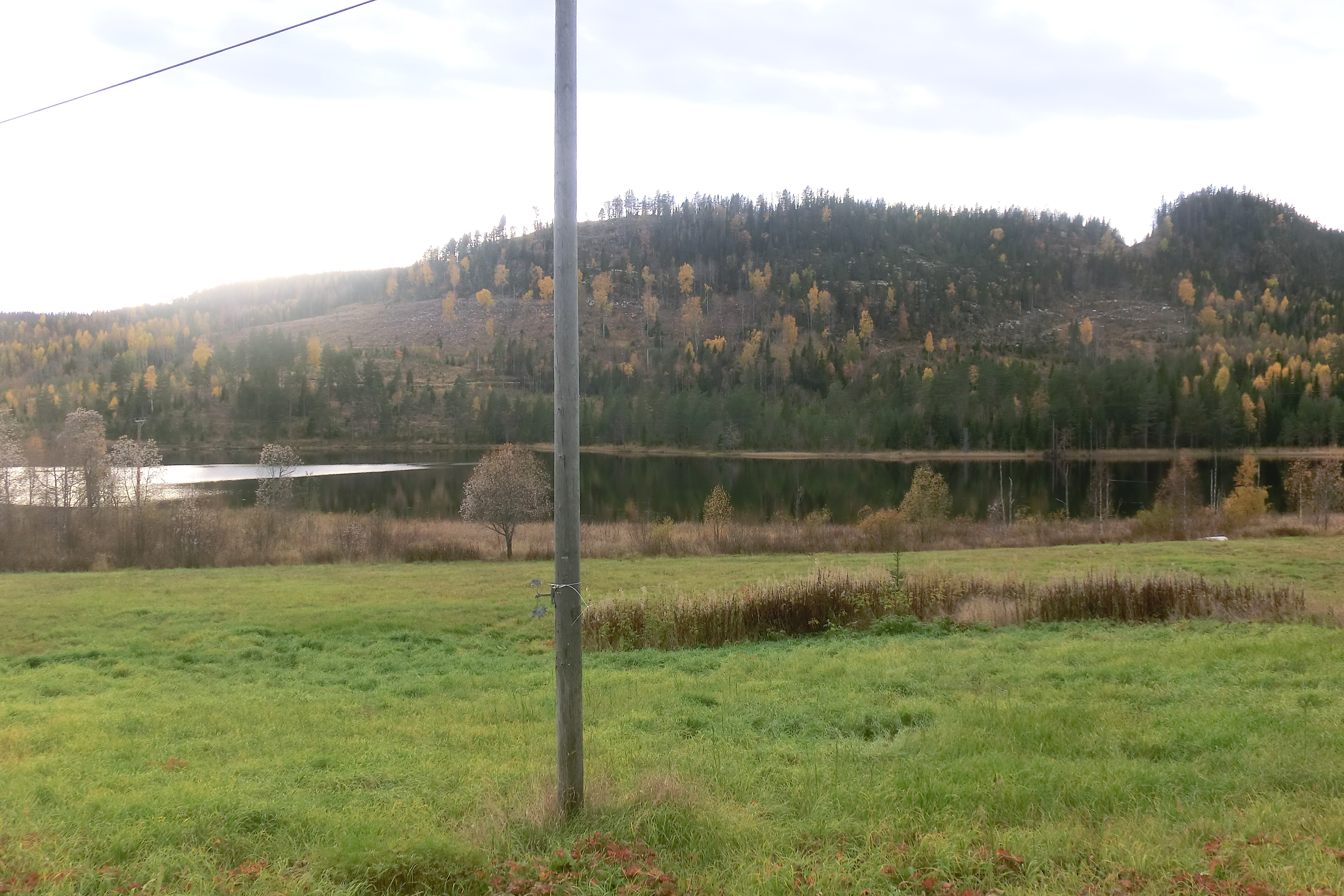 Björnsjön (Ullångers socken, Ångermanland)